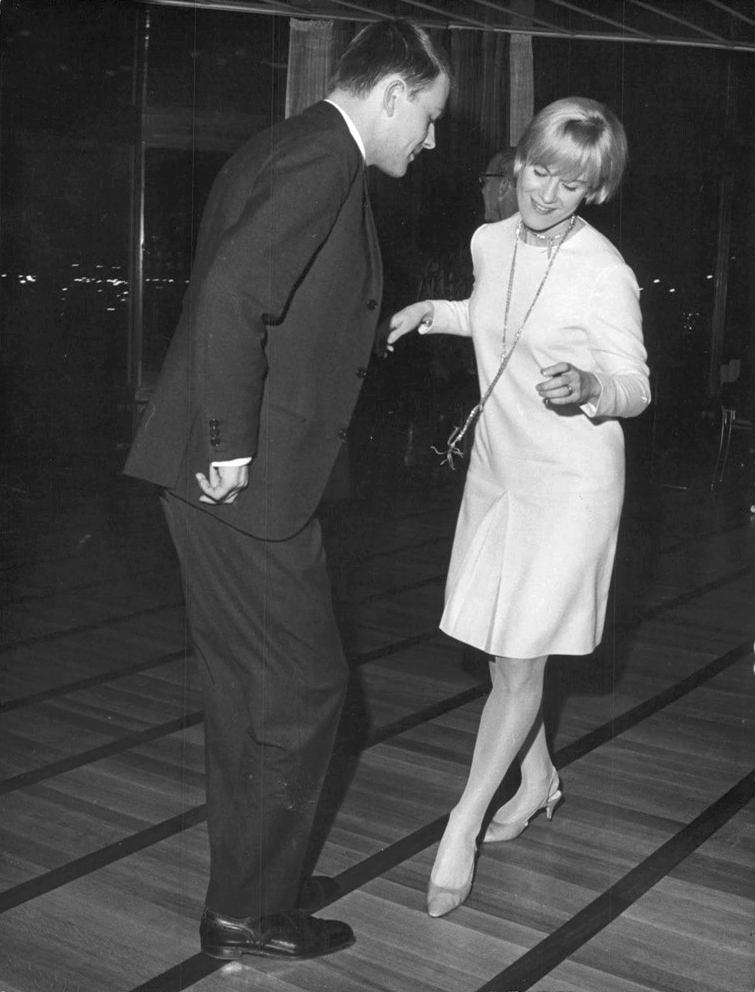 Svenska Filminstitutet anordnade filmfest på Operaterrassen med anledning av polska veckan i fredags (18/2). Förutom de polska gästerna mötte en stor del av vår egen filmelit upp. På bilden syns Bibi Andersson och Sven-Bertil Taube dansa.